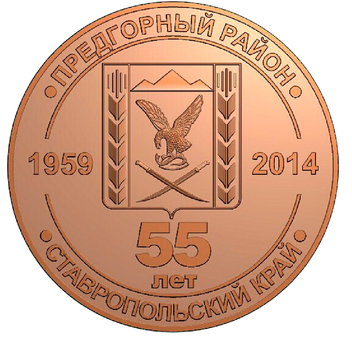 Медаль «55 лет Предгорному району Ставропольского края» (утверждена решением совета Предгорного муниципального района Ставропольского края от 24 октября 2014 года № 74)"1.1. Медаль «55 лет Предгорному району Ставропольского края» (далее — медаль) является наградой Предгорного муниципального района Ставропольского края. 1.2. Медаль вручается гражданам за значительный вклад в развитие экономики, социально-культурной сферы, муниципального управления, укрепление законности и правопорядка, в патриотическое воспитание молодежи и иные области деятельности, направленные на социально-экономическое развитие Предгорного муниципального района, обеспечение благополучия населения Предгорного муниципального района Ставропольского края"